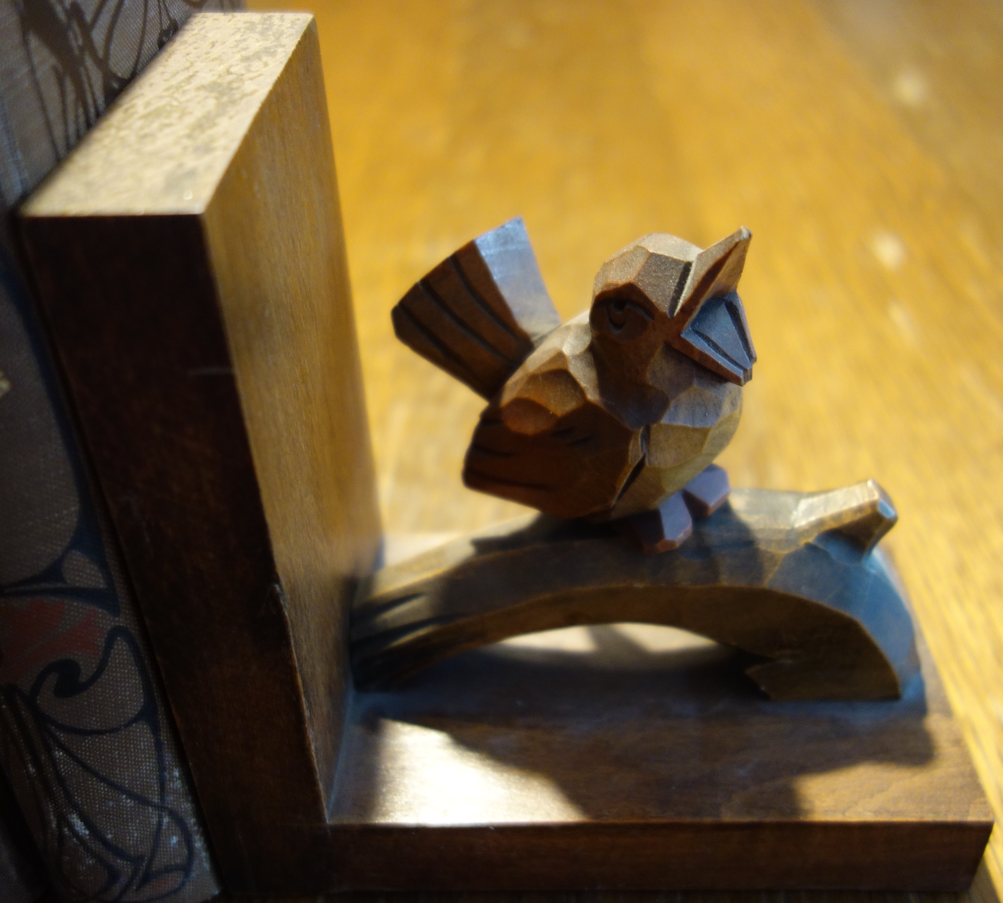 Buchstütze mit Vogelmotiv